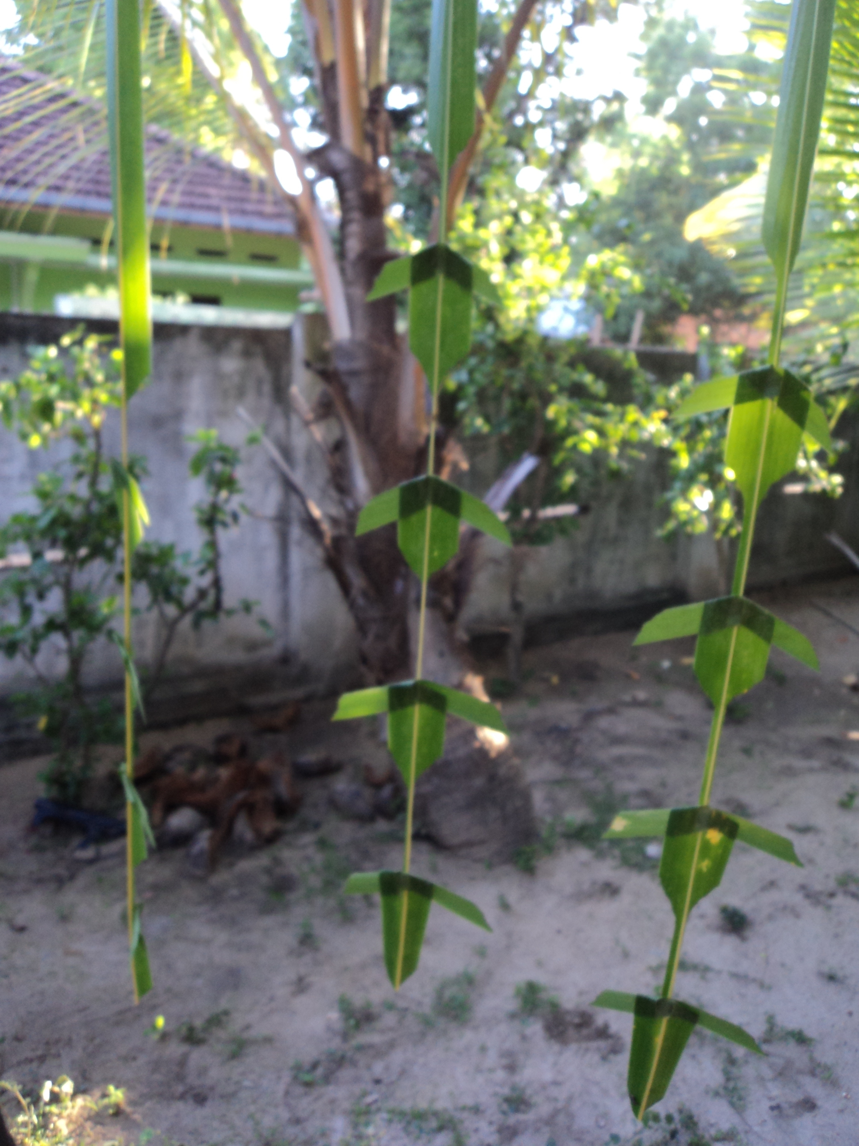 தோரணம் தமிழர்கள் நிகழ்வுகளைக் குறிக்கும் பண்பாட்டு அடையாளமாக செய்யும் ஒரு அலங்கார அமைப்பாகும்.